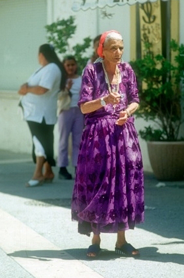 Lors du pèlerinage gitan, diseuse de bonne aventure aux Saintes-Maries-de-la-Mer